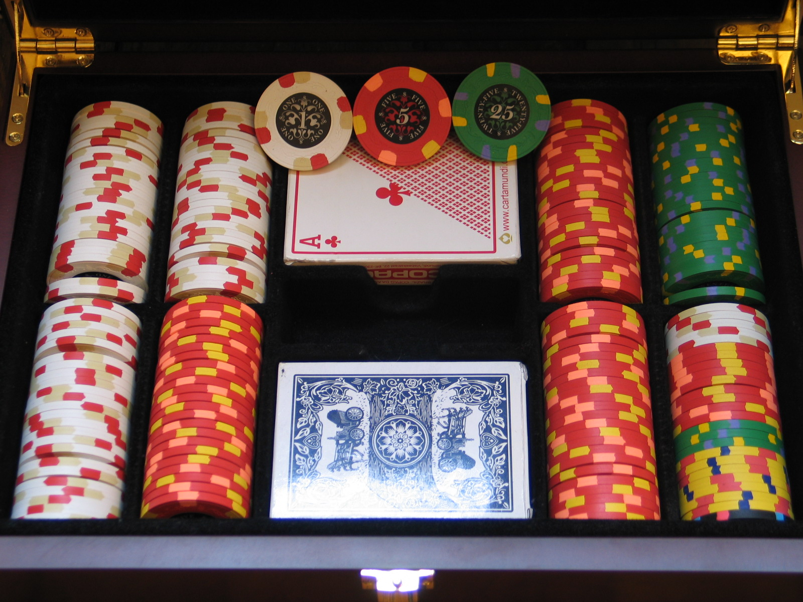 Une malette de jetons de poker en argile.